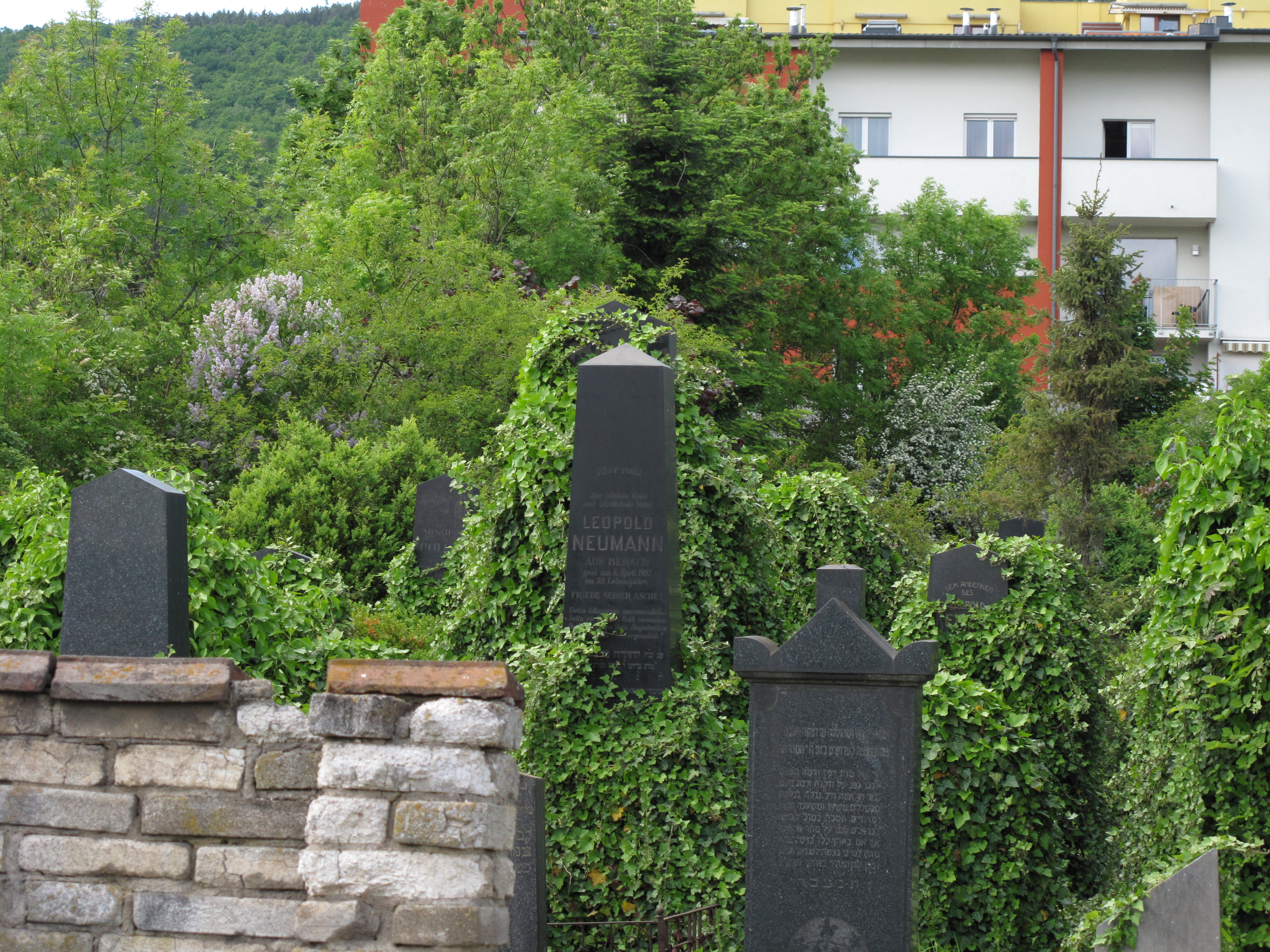 Náhrobní kameny židovského hřbitova v Berouně. Česká republika.